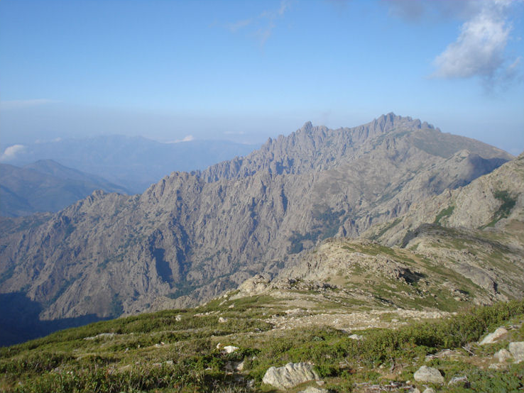 Corsu: E Penne Rosse viste da i dintorni di u Capu Biancu (2 562 m) : u Tragunatu (2 065 m) à manca è a Cima à i Mori (2 180 m) à diritta.